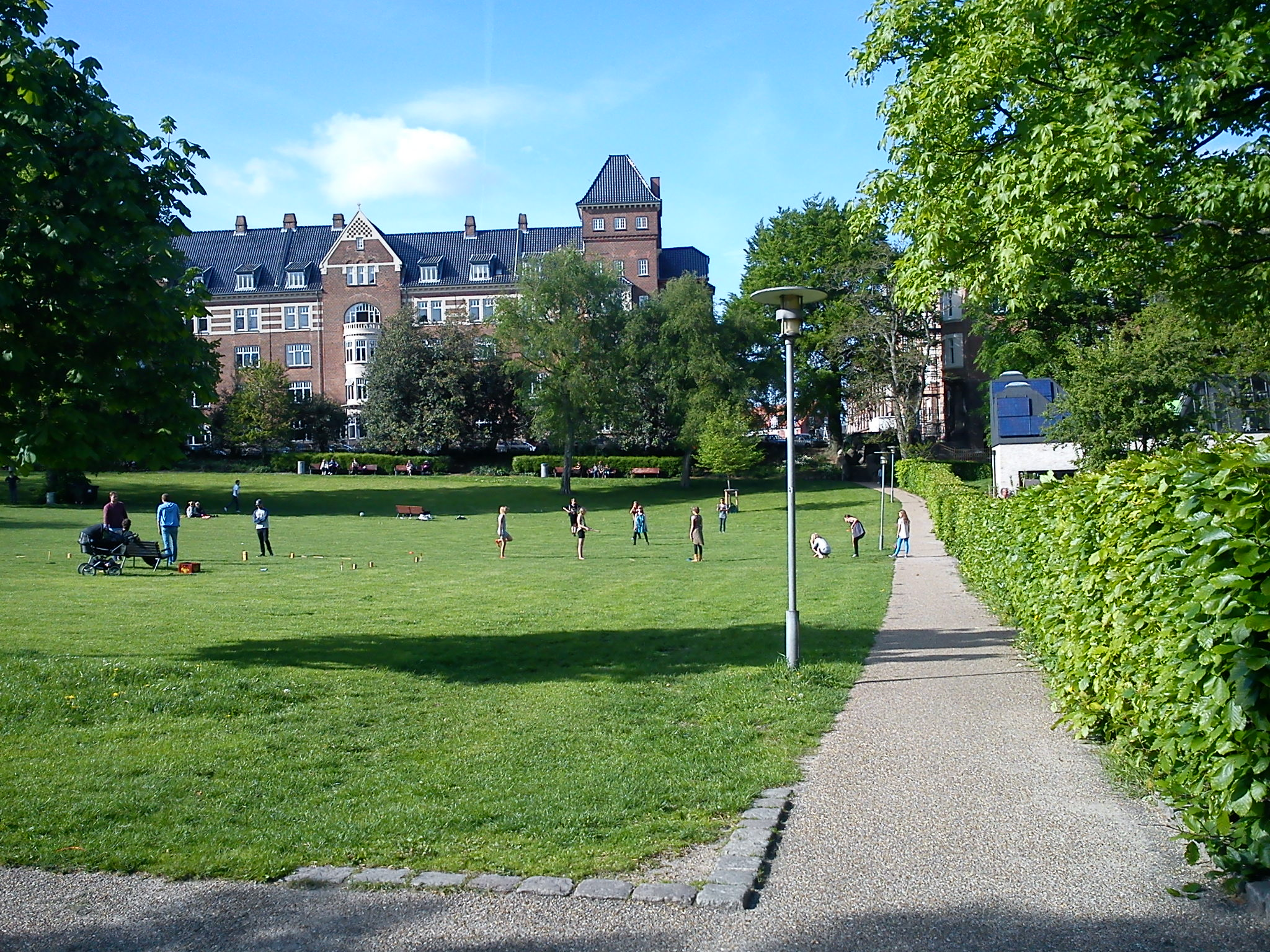 Vue over Skanseparken på Frederiksbjerg i Aarhus.